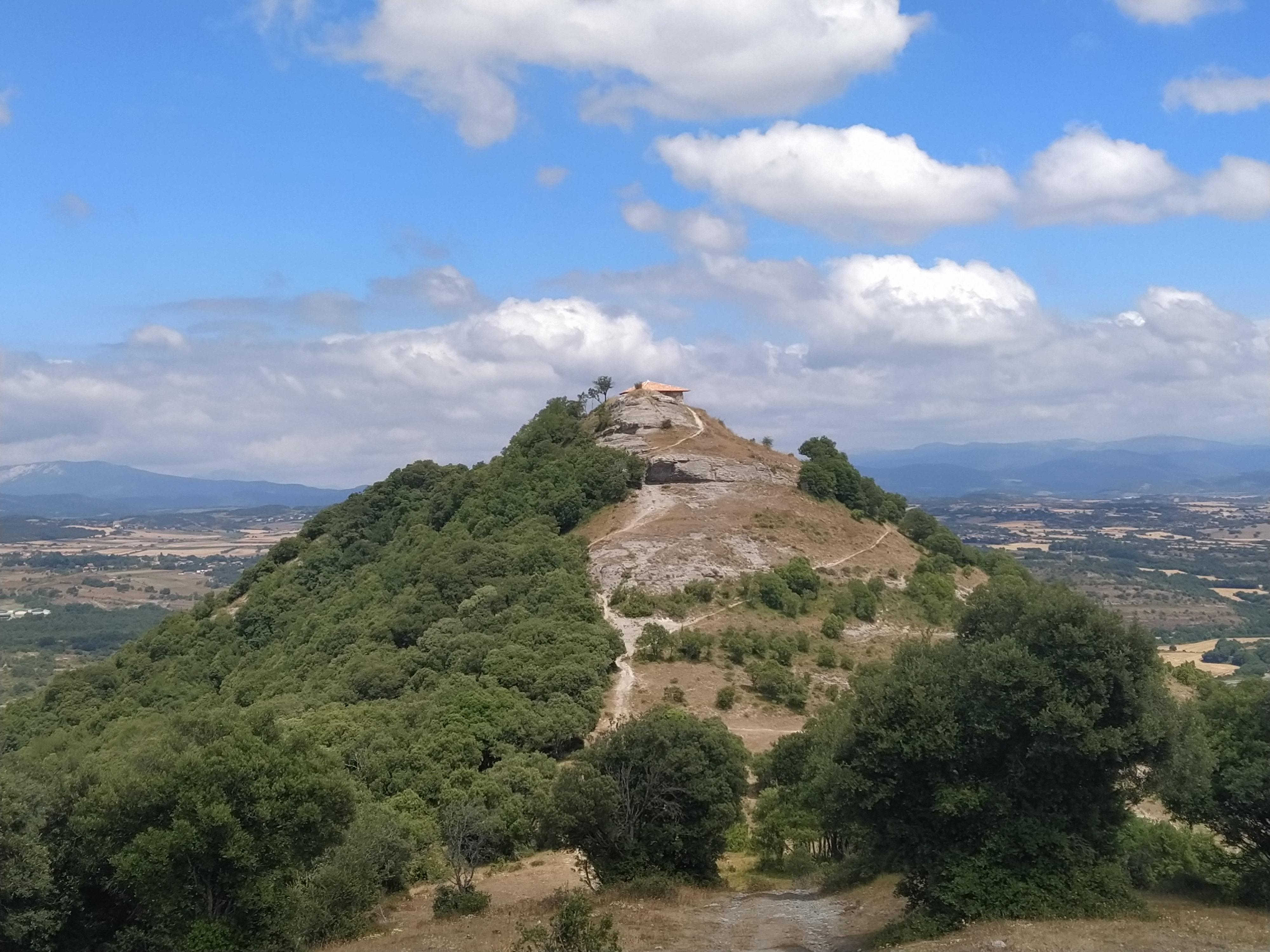 Vista del Castillo de Zaitegi - Ermita de San Bitor desde el oeste. JULIO 2020